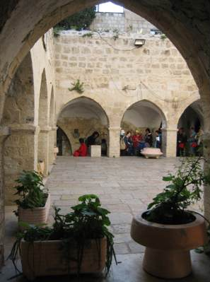 Courtyard of the ex-Franciscan monastery of Mount Zion, next to the Coenaculum (Jerusalem, Isral, 14th century). / Klaustar nekadašnjeg franjevačkog samostana na brdu Sion, uz Dvoranu Posljednje večere u Jeruzalemu (14. st.).